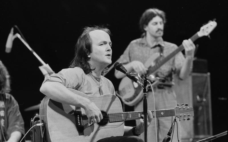 Berlin, Festival des politischen Liedes ADN-ZB/Senft/16.2.88/ Berlin: 18. Festival des politischen Liedes/ Zu den Künstlern des internationalen Sonderkonzertes am 15.2. im Palast der Republik gehörte Gerhard Schöne (l.) aus der DDR. Er sang seine Lieder einfühlsam und voller Nachdenklichkeit. Mit großer Begeisterung wurden vom Publikum die Titel "Tagebuch" und "Du hast es nur noch nicht probiert" aufgenommen. Abgebildete Personen: Schöne, Gerhard: Liedermacher, DDR